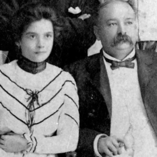 La periodista zuliana Teresa López Bustamante, fundadora del diario "La Columna", junto a su padre, el editor marabino Eduardo López Rivas.